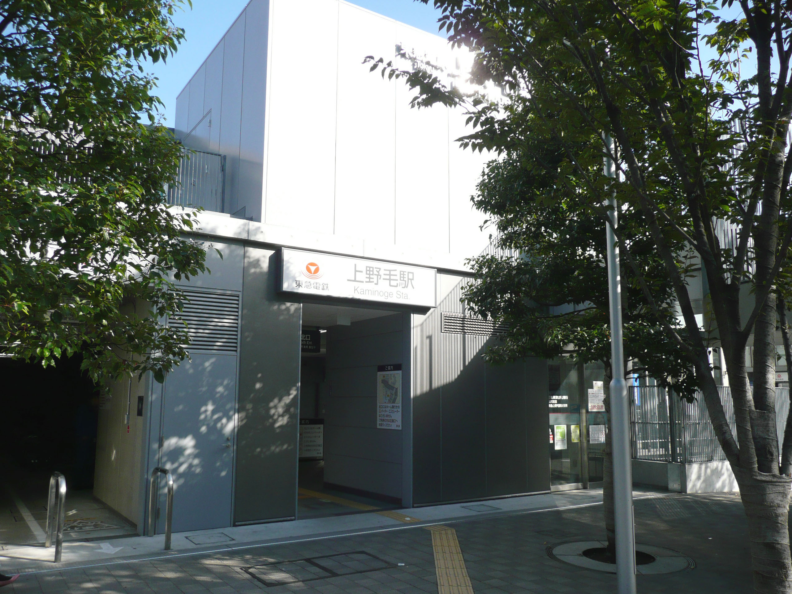 上野毛駅北口